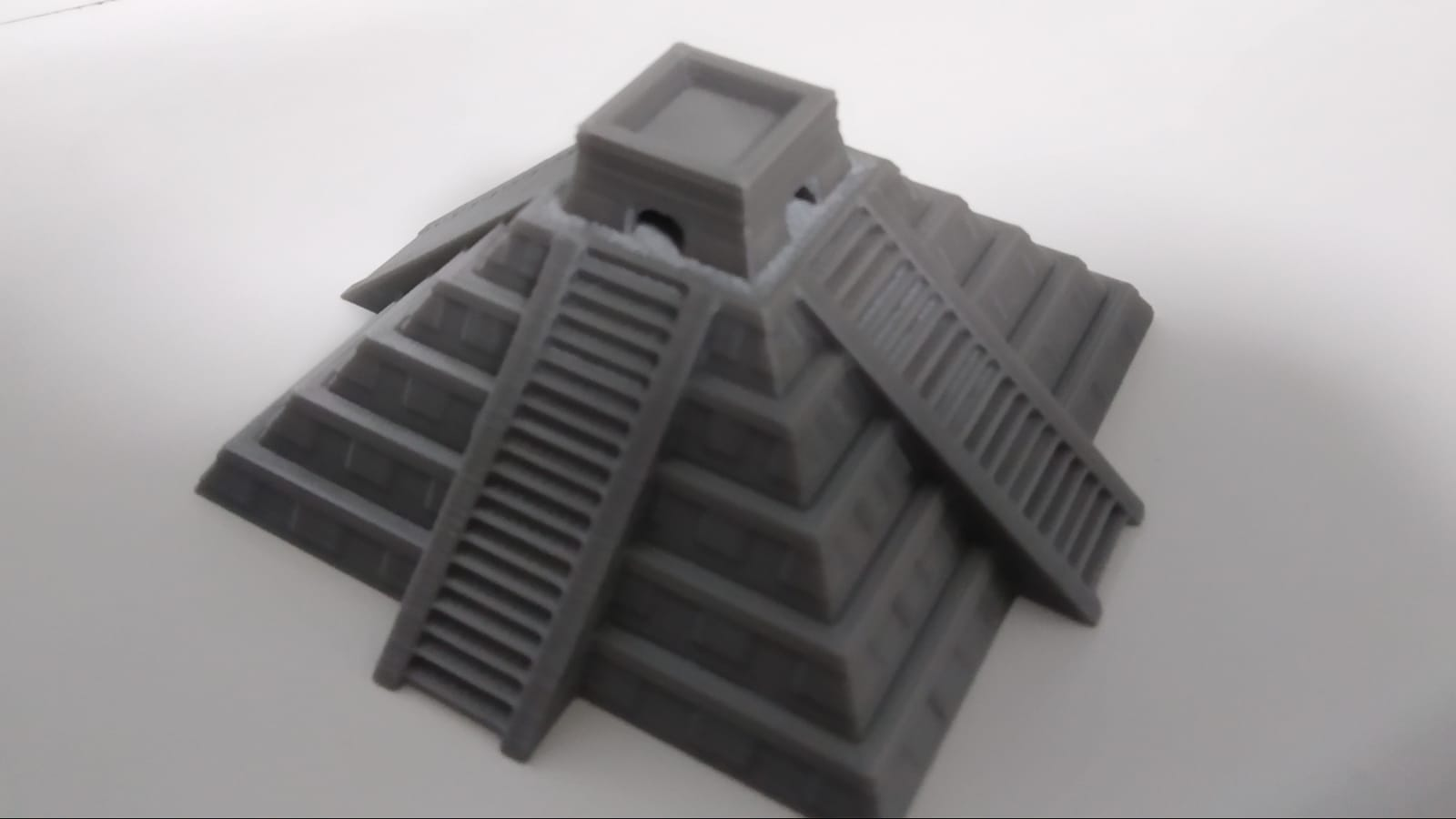 Vytištěná na 3D tiskárně Ender 3